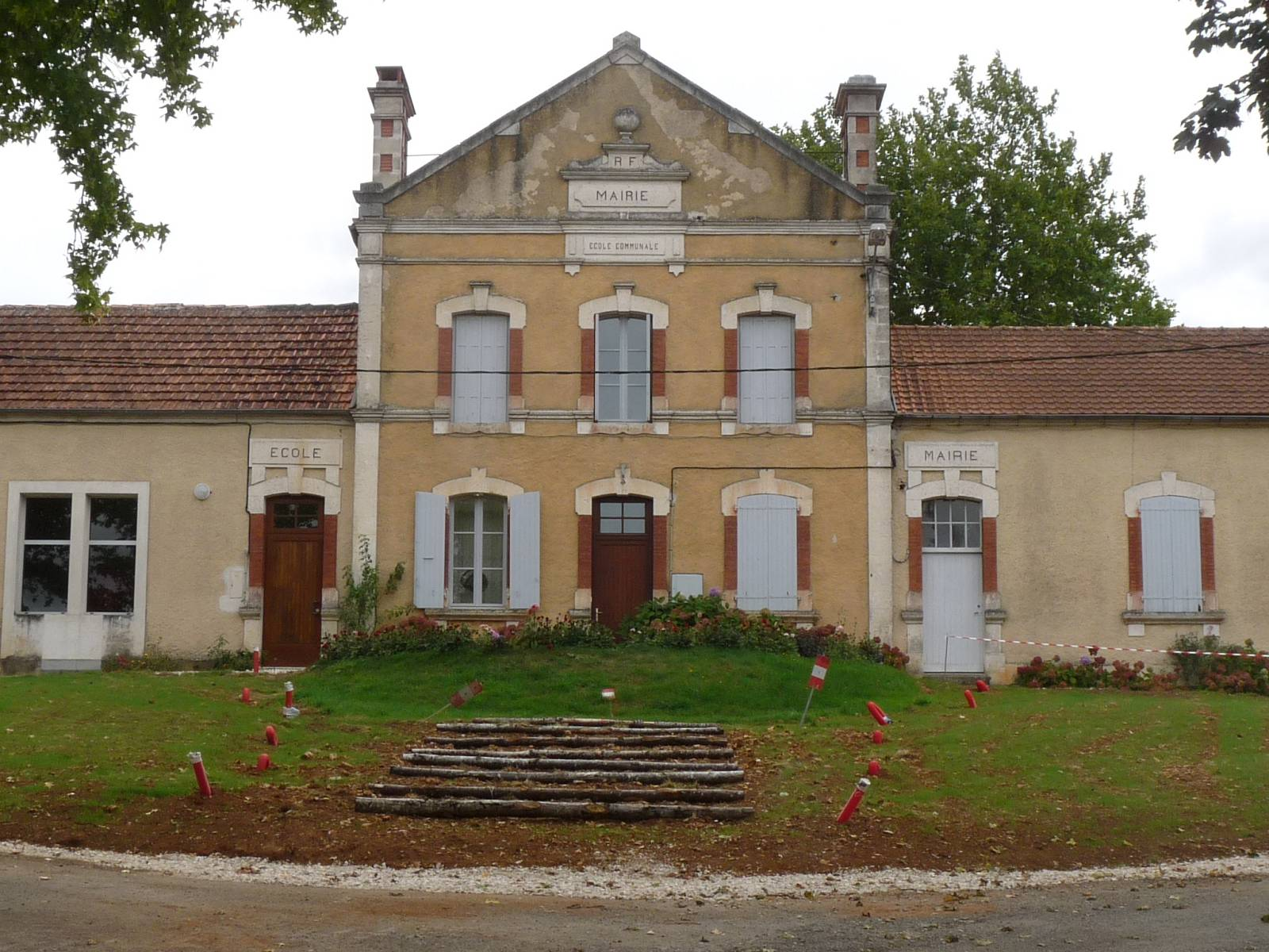 la mairie de Bioussac, Charente, France